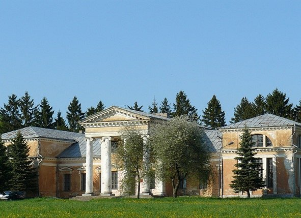 Аг. Снов в Несвижском районе Минской области, дворец Рдултовских, 1827г. Сейчас в этом здании находится военный госпиталь пограничных войск. Фото путешествия по Беларуси.